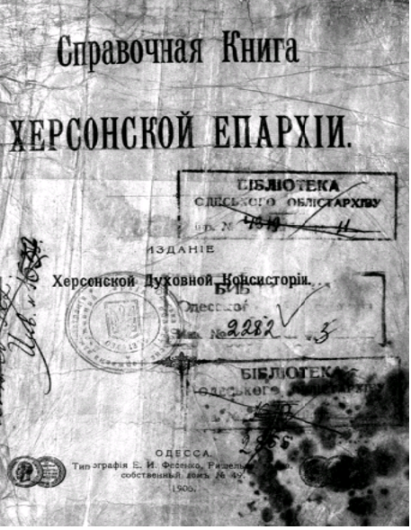 VSergo3